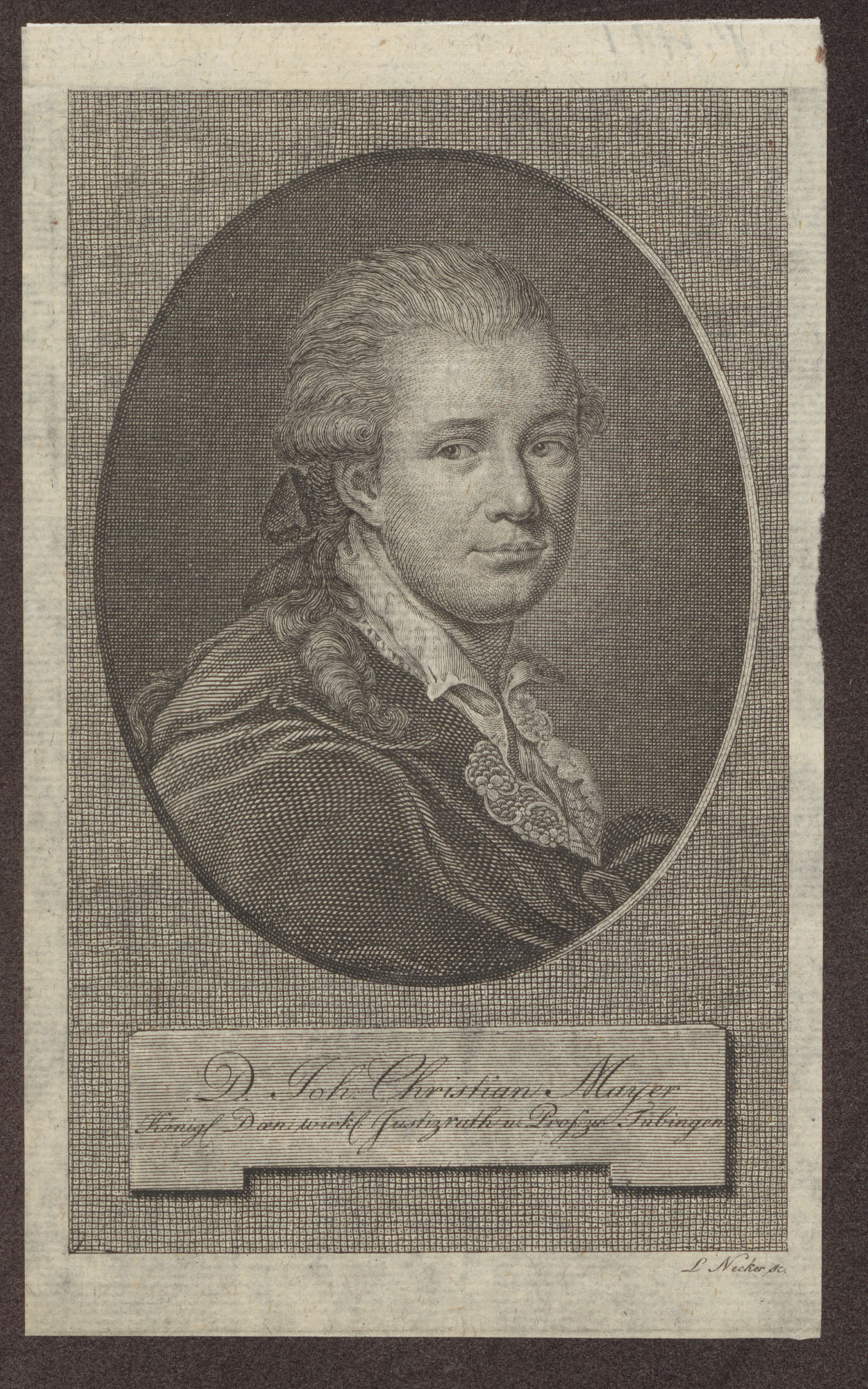 Johann Christian Majer, ab 1808 von Majer (auch Mayer oder Maier; * 25. Dezember 1741 in Ludwigsburg; † 3. August 1821 in Tübingen), war ein deutscher Rechtswissenschaftler und Hochschullehrer.